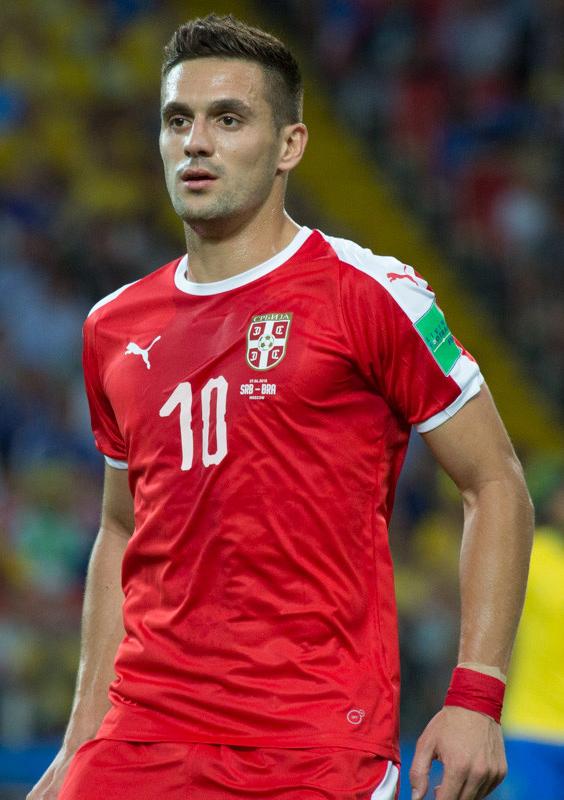 Сборная Бразилии оставляет Сербию за бортом ЧМ-2018 и выходит в плей-офф